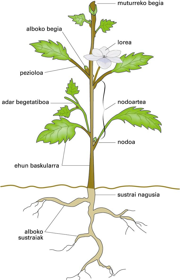 Landare angiospermo baten oinarrizko atalak